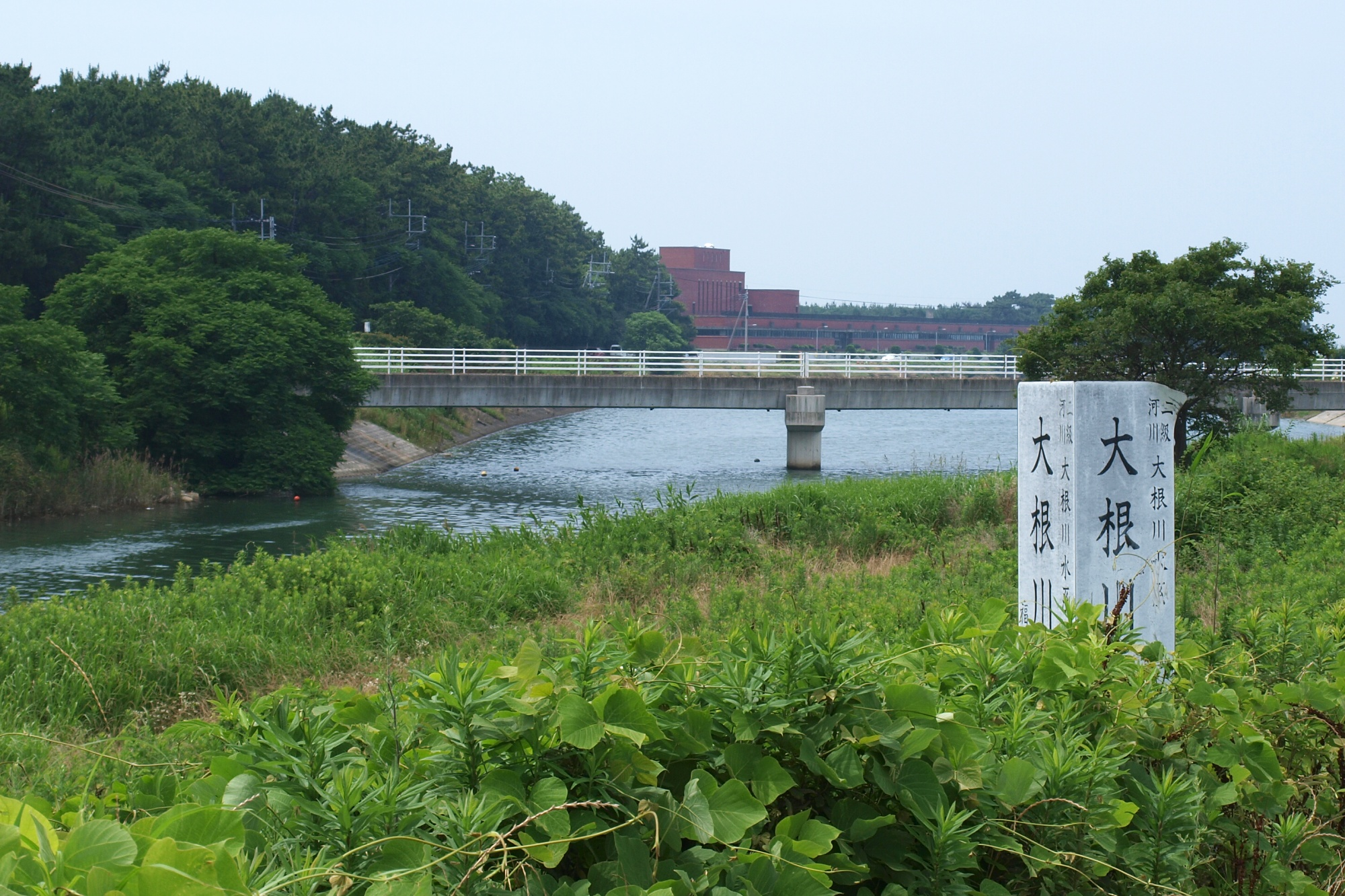 福岡県古賀市 大根川下流